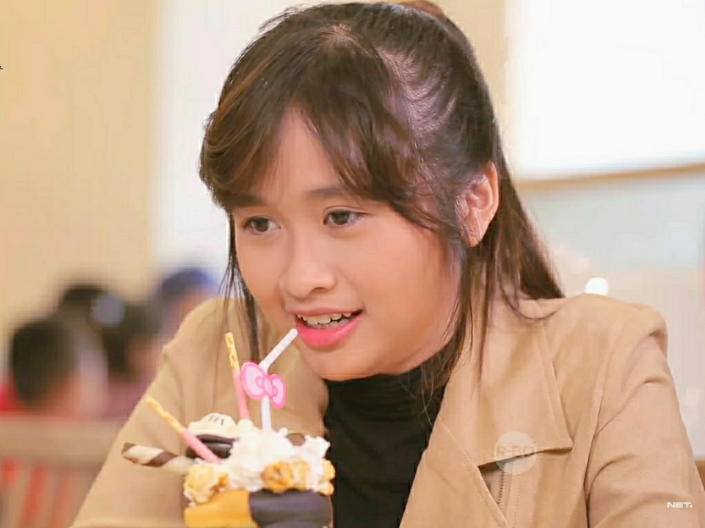 Gritte Agatha di acara Lintas Imaji NET. TV pada tahun 2017. Photo adalah hasil tangkapan layar dari video yang diunggah oleh Netmediatama dengan judul "Lintas Imaji Gritte Menghasilkan Gambar yang Dipikirkan Romy Rafael " yang dilisensikan Lisensi Atribusi Creative Commons (boleh digunakan kembali).